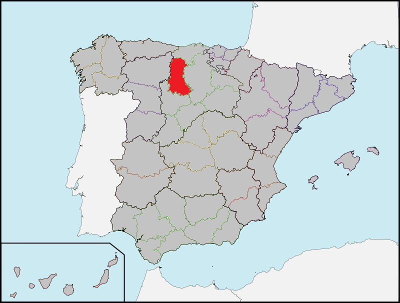 Ubicación de la provincia de Palencia en la España de los años treinta